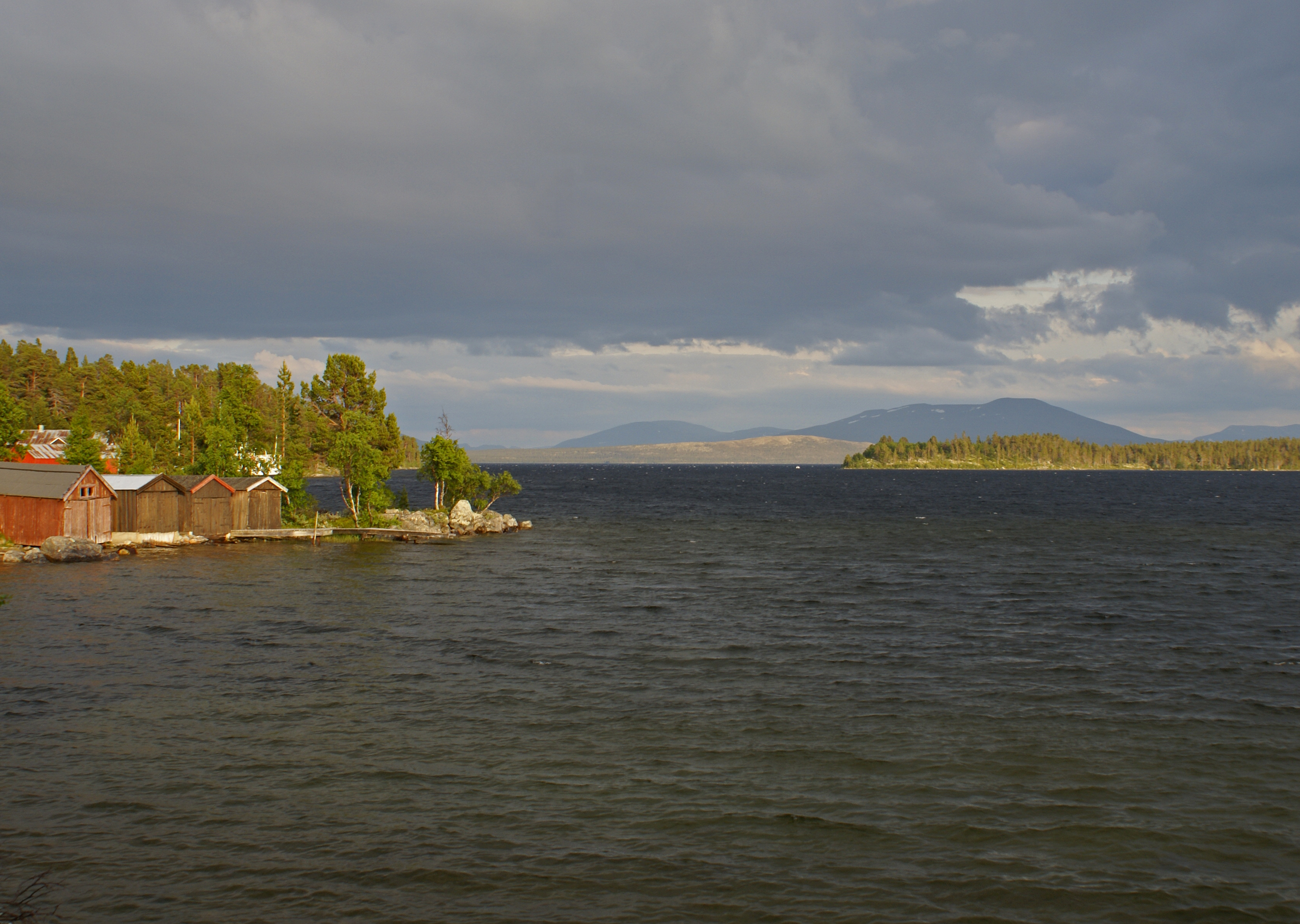 From Femunden, Norway